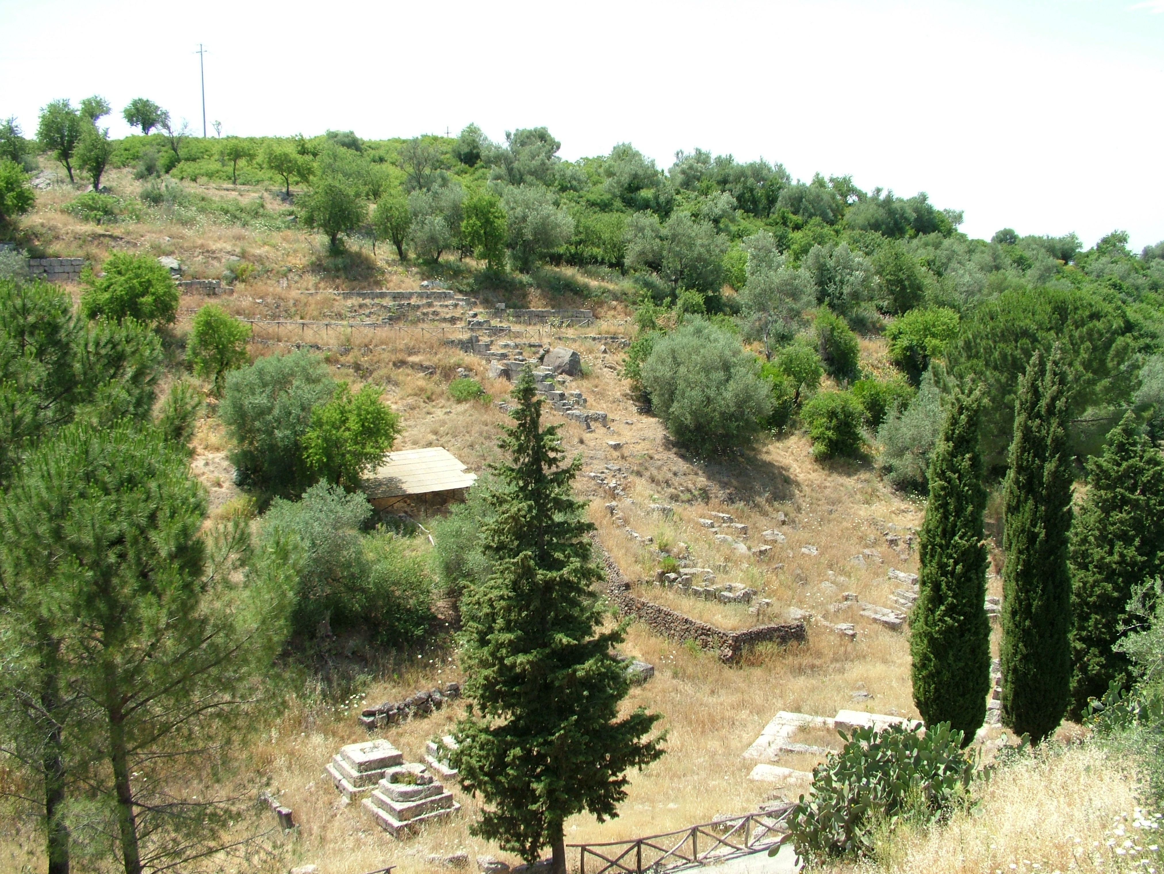 Lentini, Sizilien, Ausgrabungsstätten Leontinoi